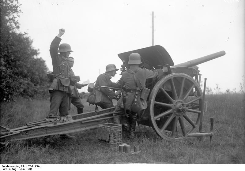 Deutschlands Wehrmacht im Gegensatz zu dem Wettrüsten der Anderen! Eine interessante Gegenüberstellung der uns nach dem Versailler Vertrag zugelassenen Waffen, die gegen die Rüstung der Entente-Länder völlig machtlos sind. Information added by Wikimedia users.Ein 7,5 Geschütz, Deutschlands schwerste Artillerie-Waffe laut Versailler Vertrag.